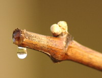 Rebträne oder Rebenblut